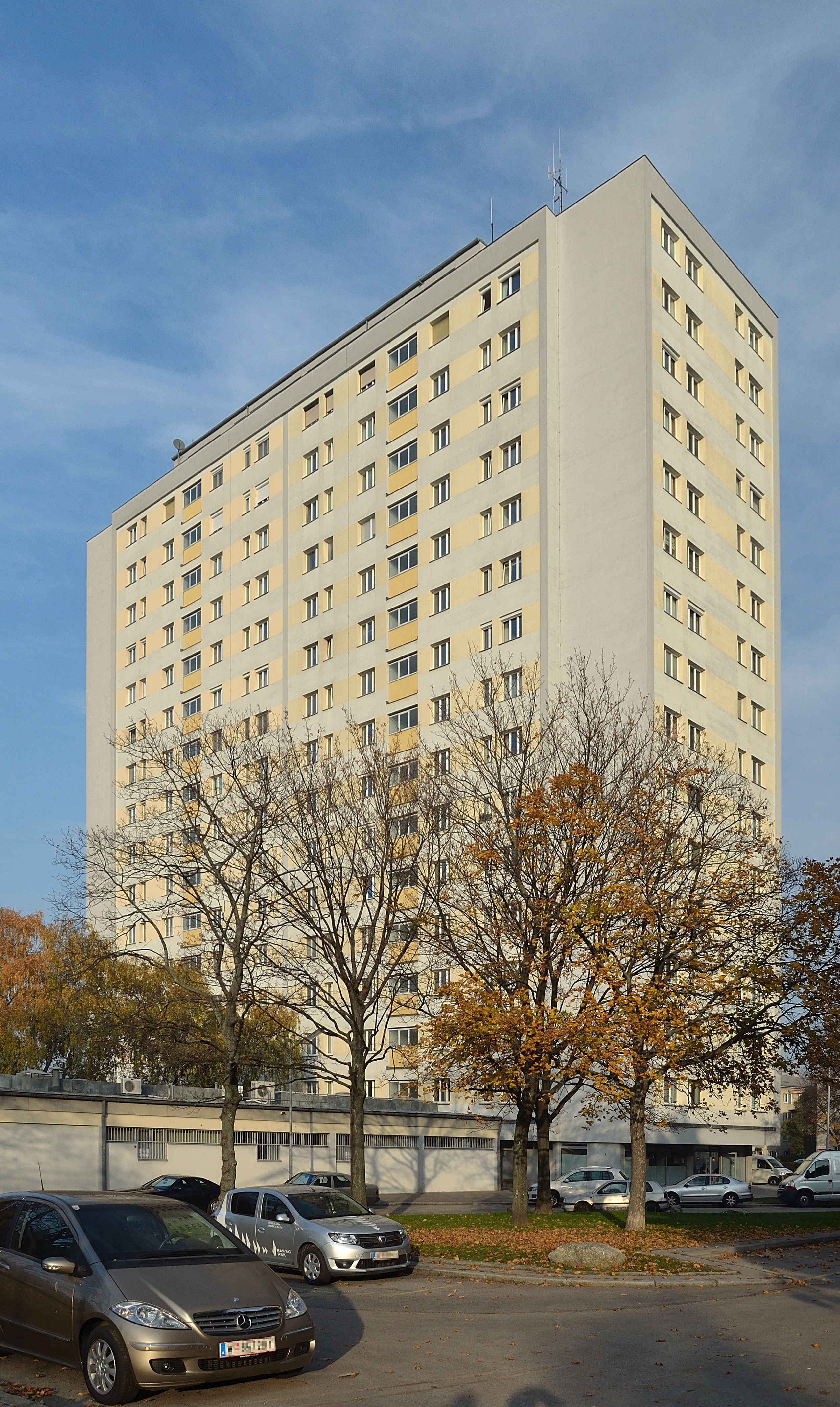 Gemeindebau (1960-63) von Hans und Walter Jaksch sowie Siegfried Theiß, Laaer-Berg-Straße 32, Wien-Favoriten